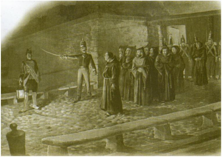 Ilustración sobre la expulsión de los monjes franciscanos de Montevideo, Uruguay, en 1811, el contexto de la Revolución Oriental.